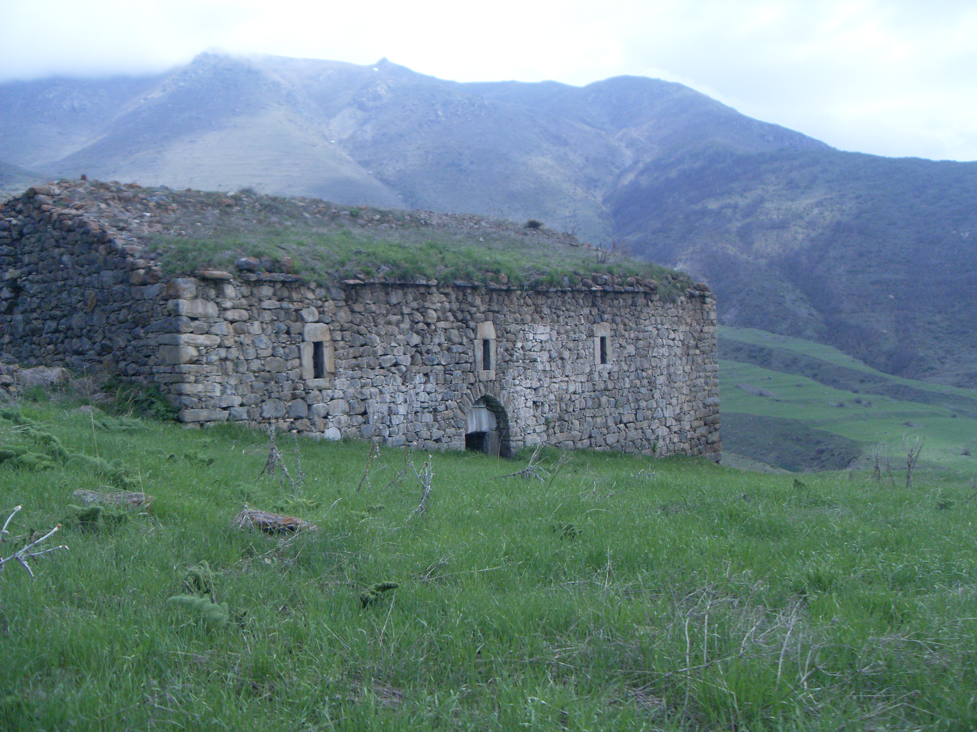 Վանական համալիր Կուսանաց անապատ 9/16.1